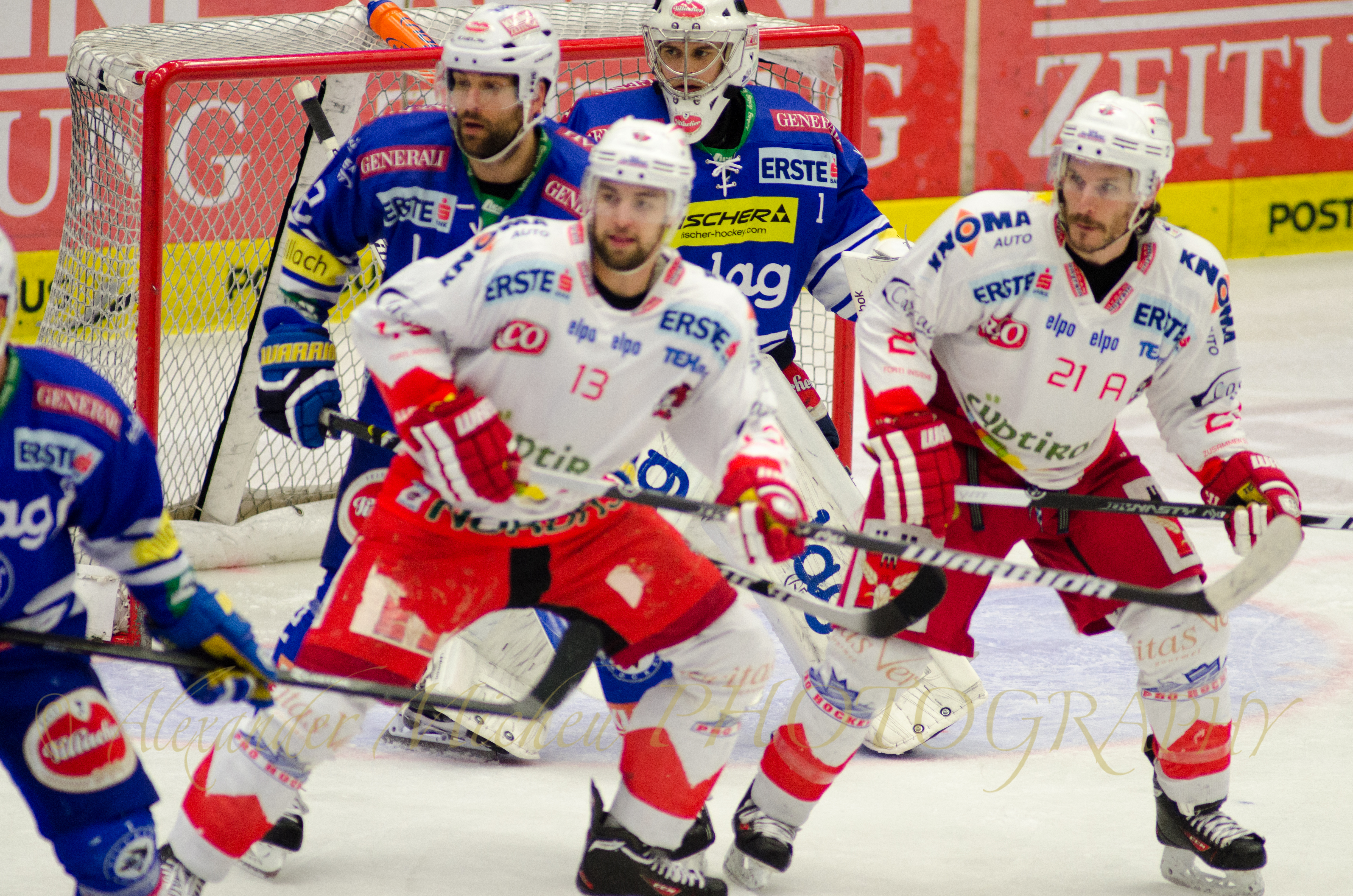 hockey pictures-micheu-EC VSV vs HCB Südtirol 03252014 (94 von 180)